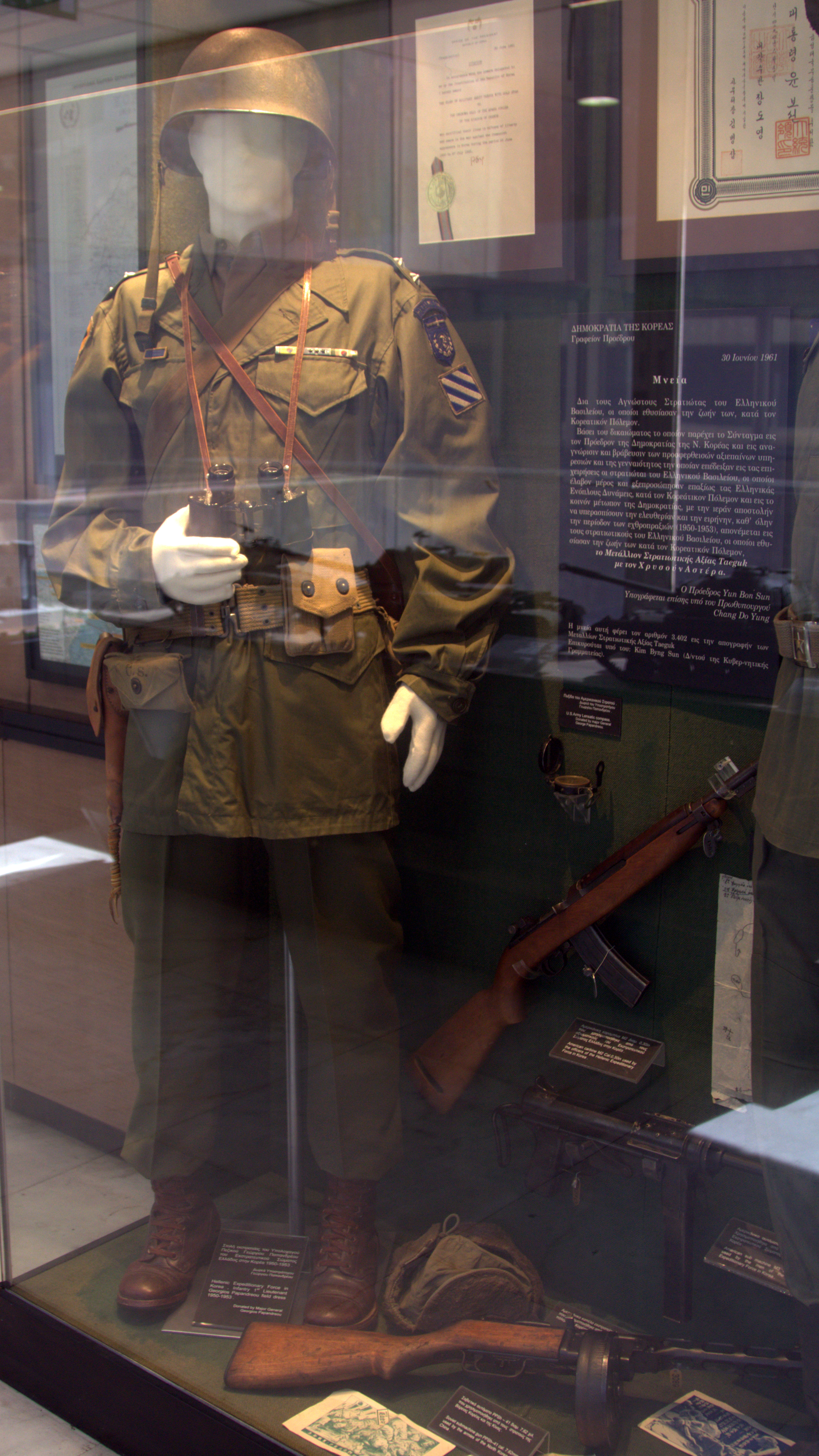 Hellenic War Museum (Athens, Greece). --- Ελληνικό Εκστρατευτικό Σώμα Κορέας. Πολεμικό Μουσείο Ελλάδος. Αθήνα.